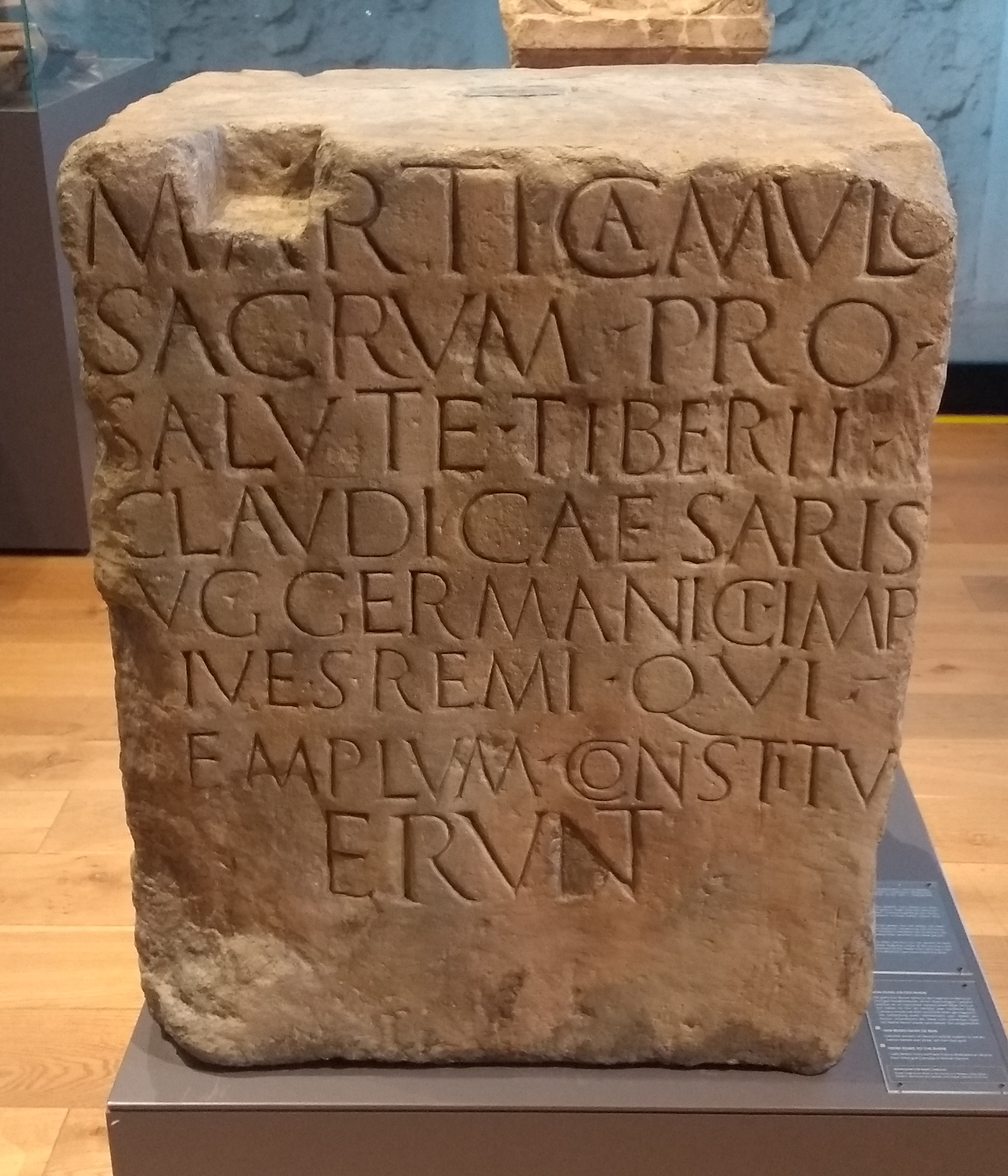 Altar für Mars Camulus, CIL XIII 8701 = AE 1980, 656 (Kopie im LVR-RömerMuseum)